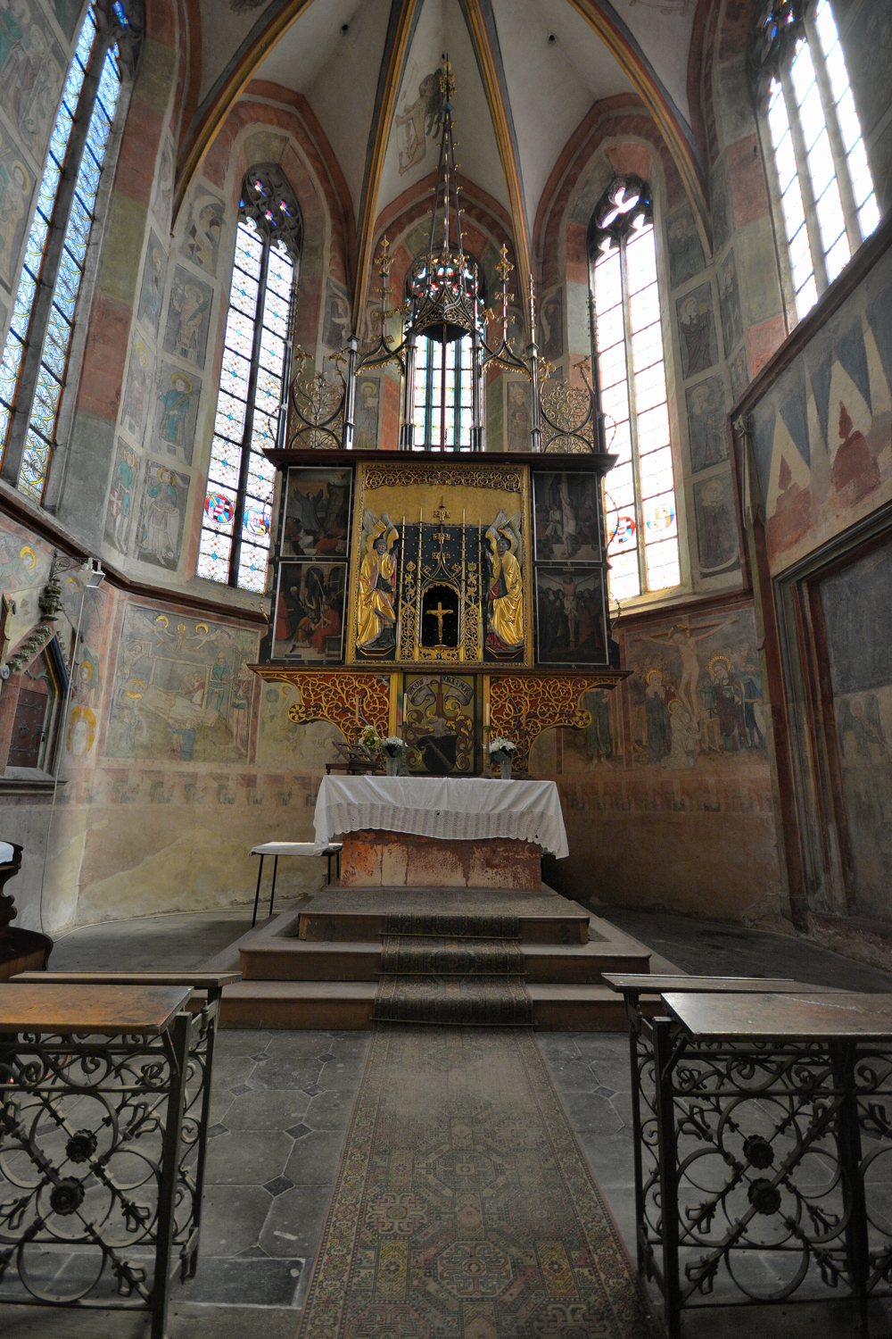 Kostel sv. Jakuba, Slavětín